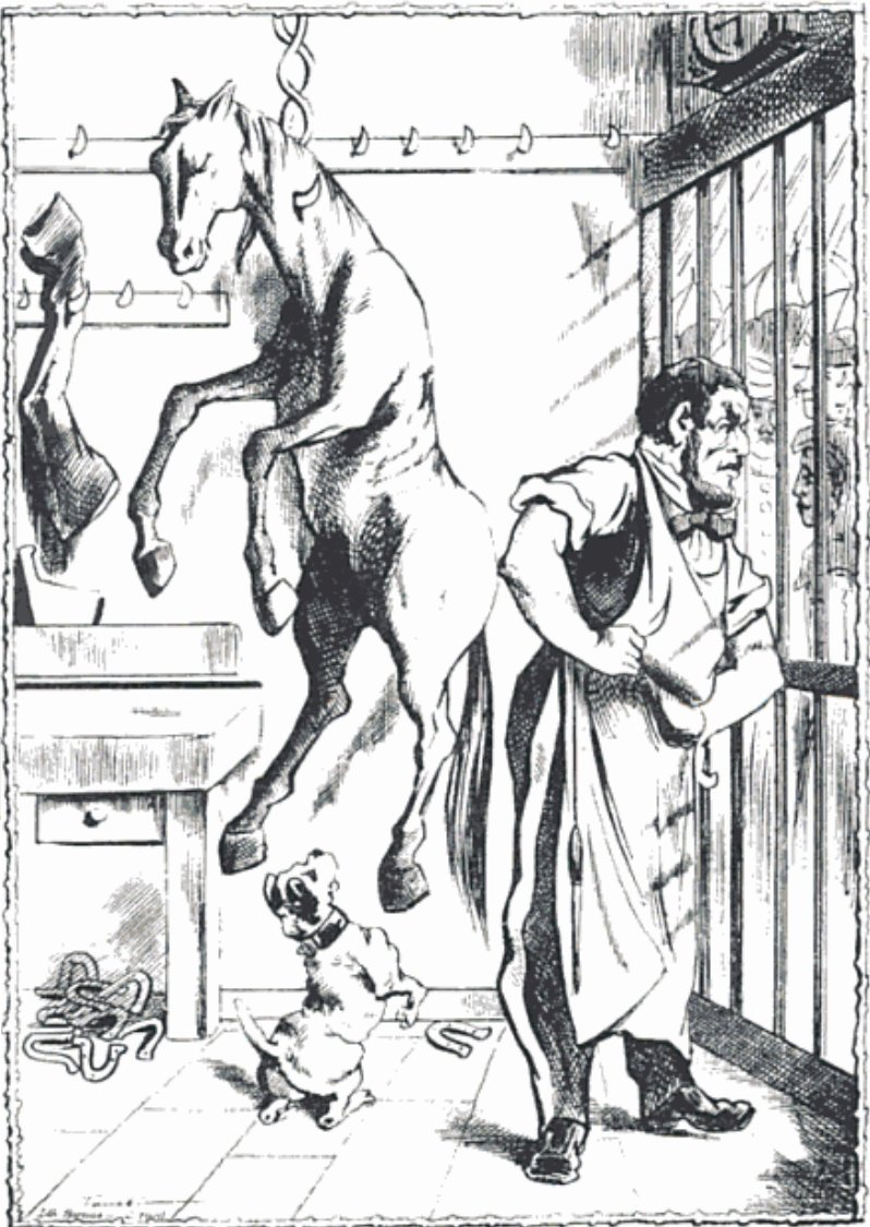 Paris, la Commune : hippophagie en raison des restrictions alimentaires et de la famine.